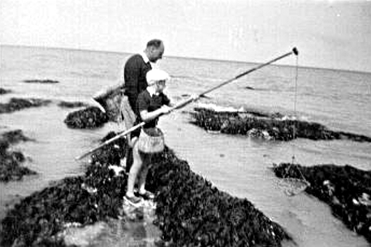 Un père montre à son garçon comment pêcher aux balances les bouquets (crevettes) dans les "bancs" à Veules-les-Roses (du côté de Sotteville-sur-Mer).